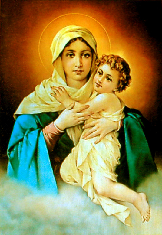 Gottesmutter von Valendar (Germany)(«Dreimal Wunderbare Mutter»)